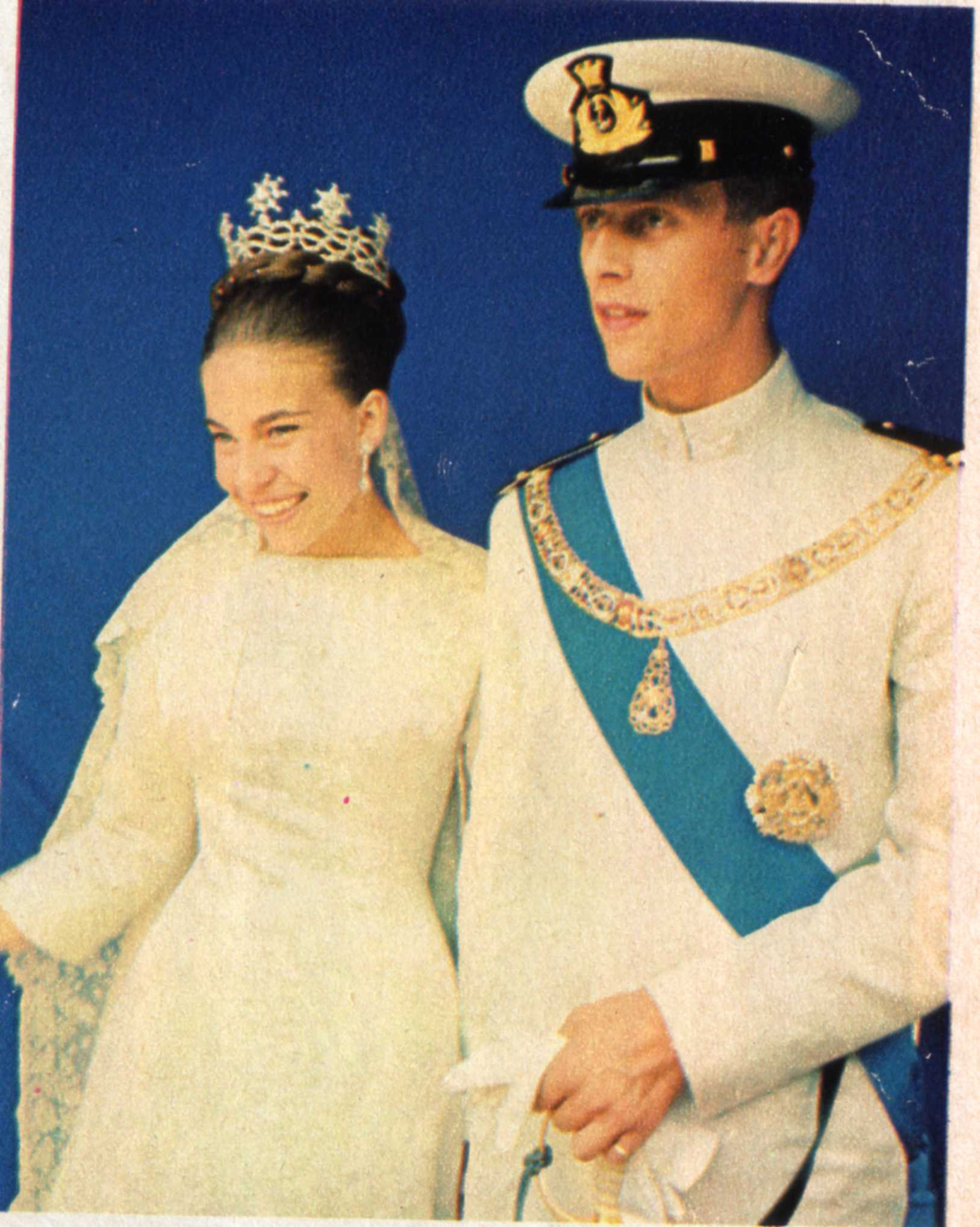 Claudia d'Orléans e Amedeo di Savoia Aosta il giorno delle lore nozze avvenute il 22 luglio 1964